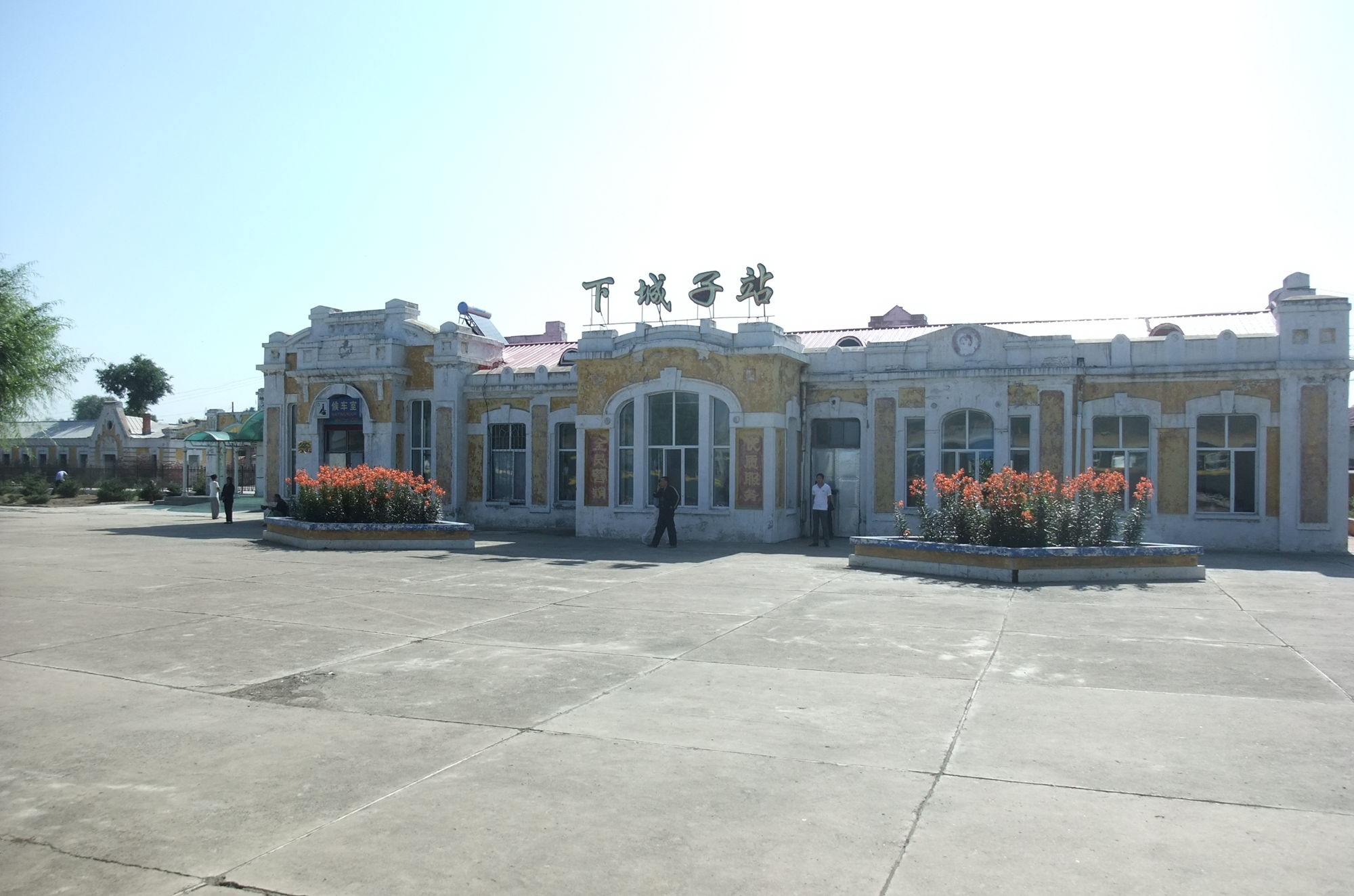 黑龙江省下城子站